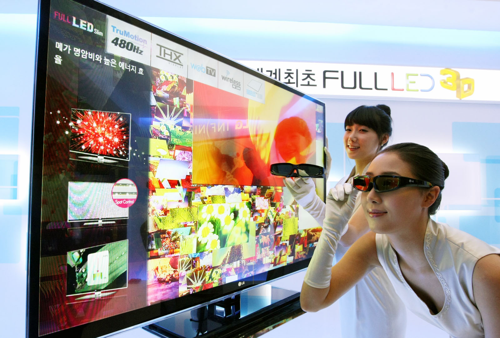 LG전자, 세계 최초 풀(Full) LED 3D TV 출시